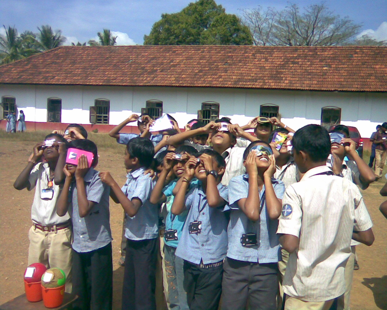 സൂര്യഗ്രഹണം വീക്ഷിക്കുന്ന വിദ്യാർഥികൾ